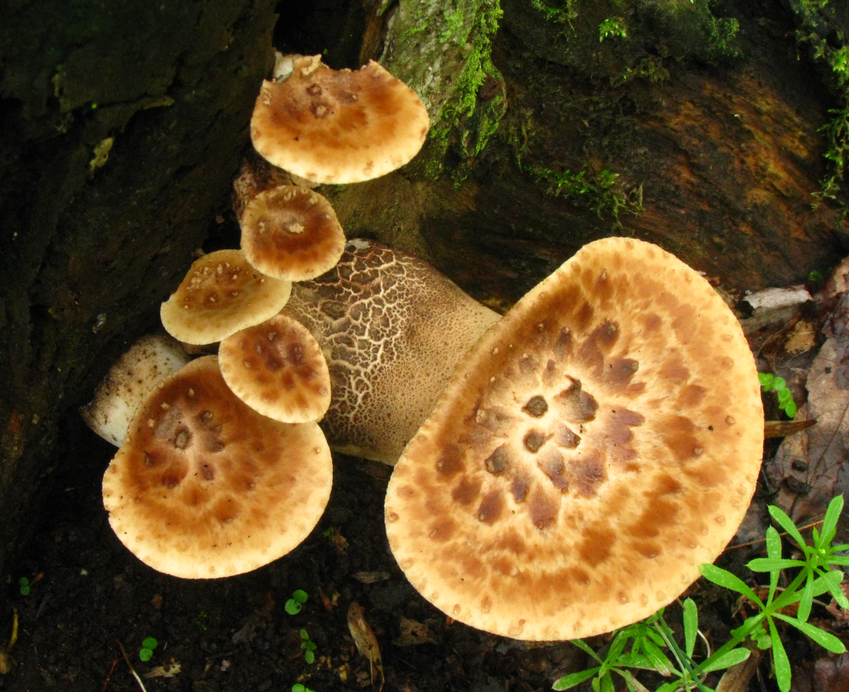 Polyporus squamosus (Huds.) Fr.